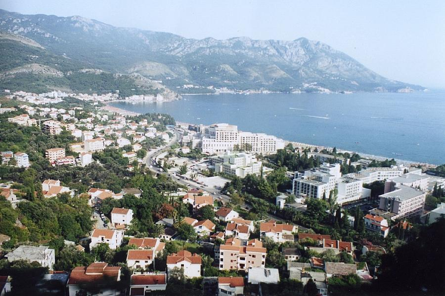 Bečići as it seen from mountain road “Cetinje — Budva”